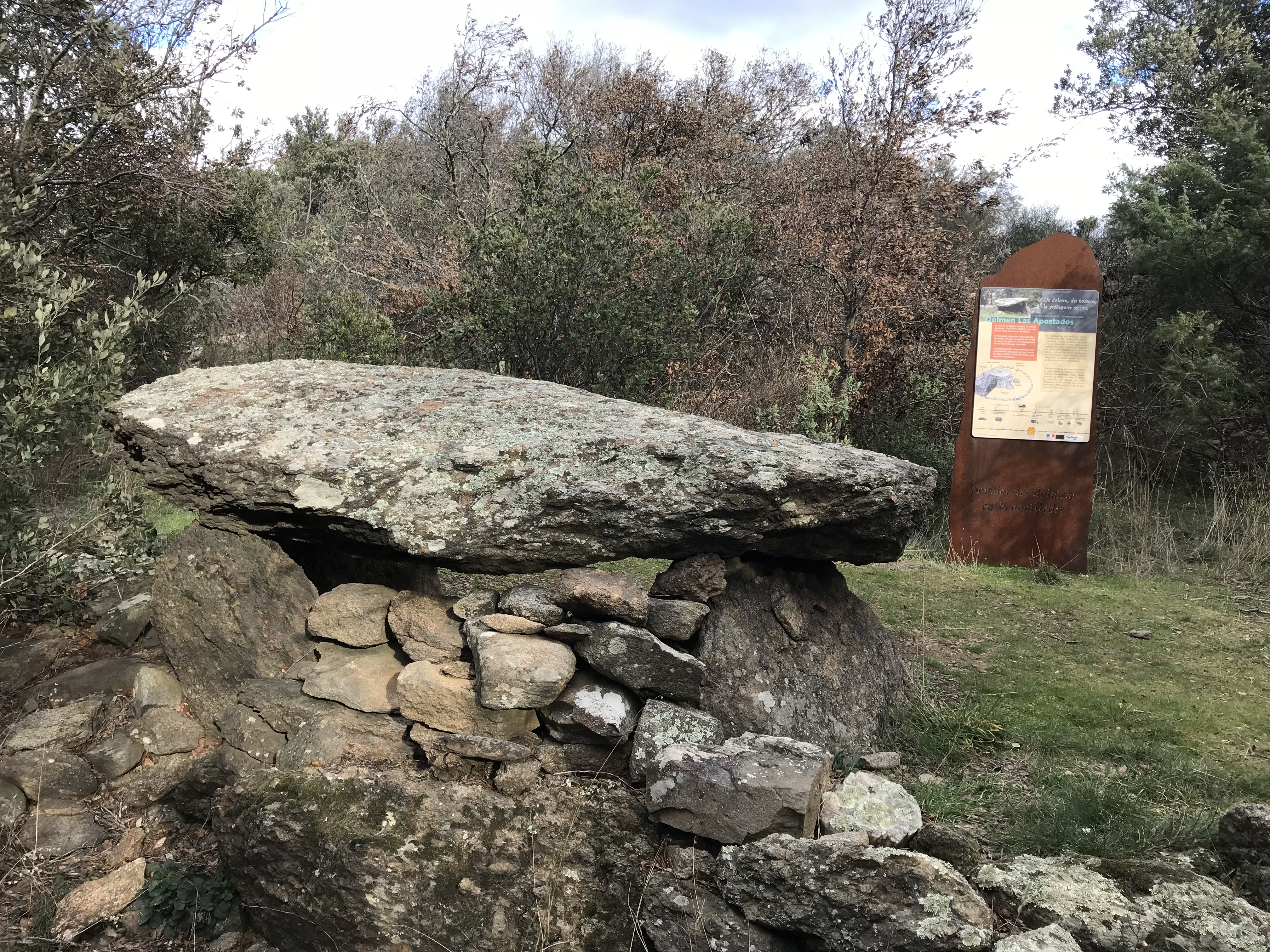 Dolmen de las Apostados, Trilla (Pyrénées-Orientales, France).